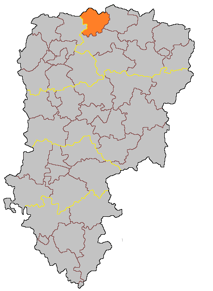 Кантон Вассиньи на карте департамента Эна